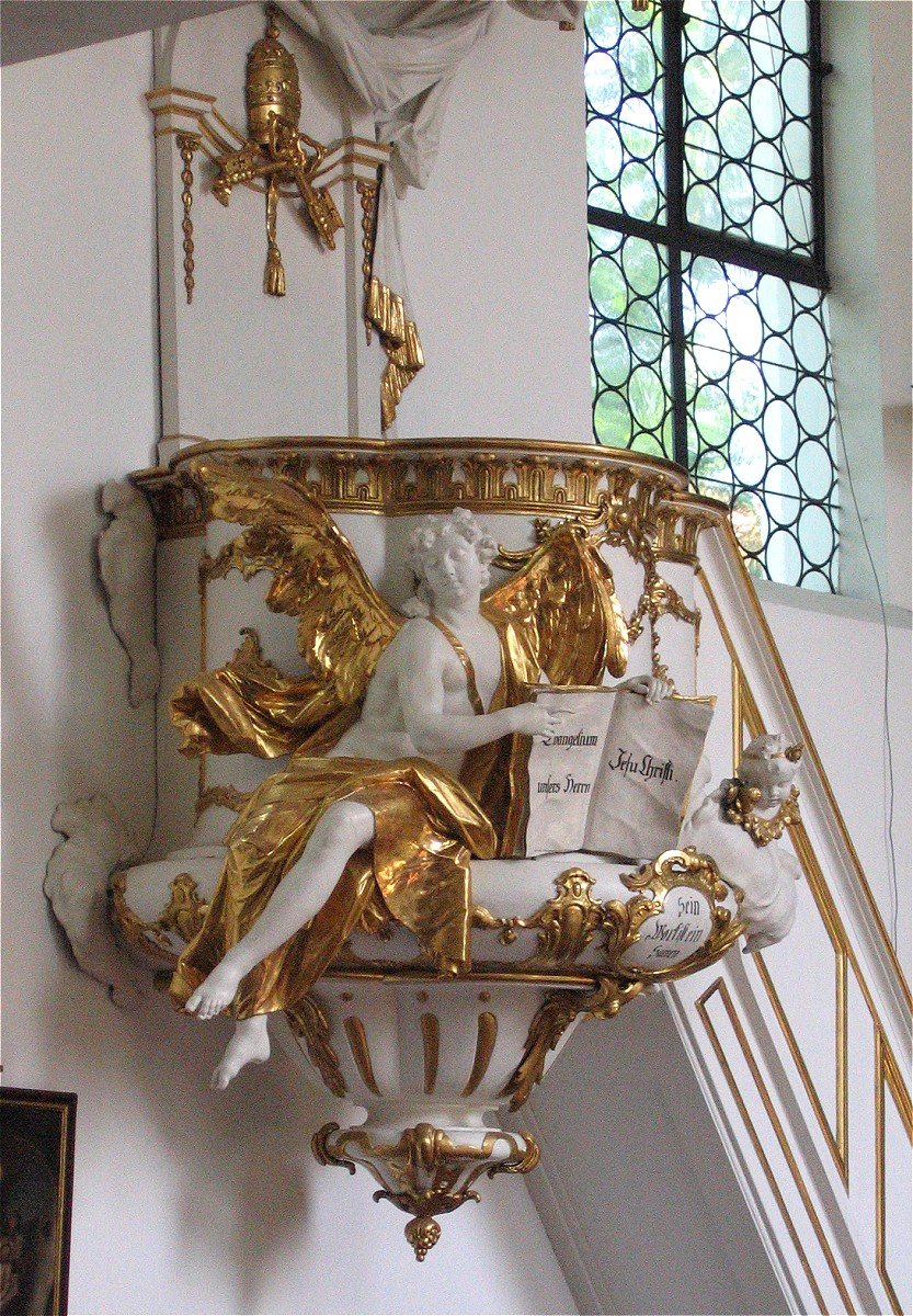 St. Georg München-Bogenhausen, Kanzel, Ignaz Günther